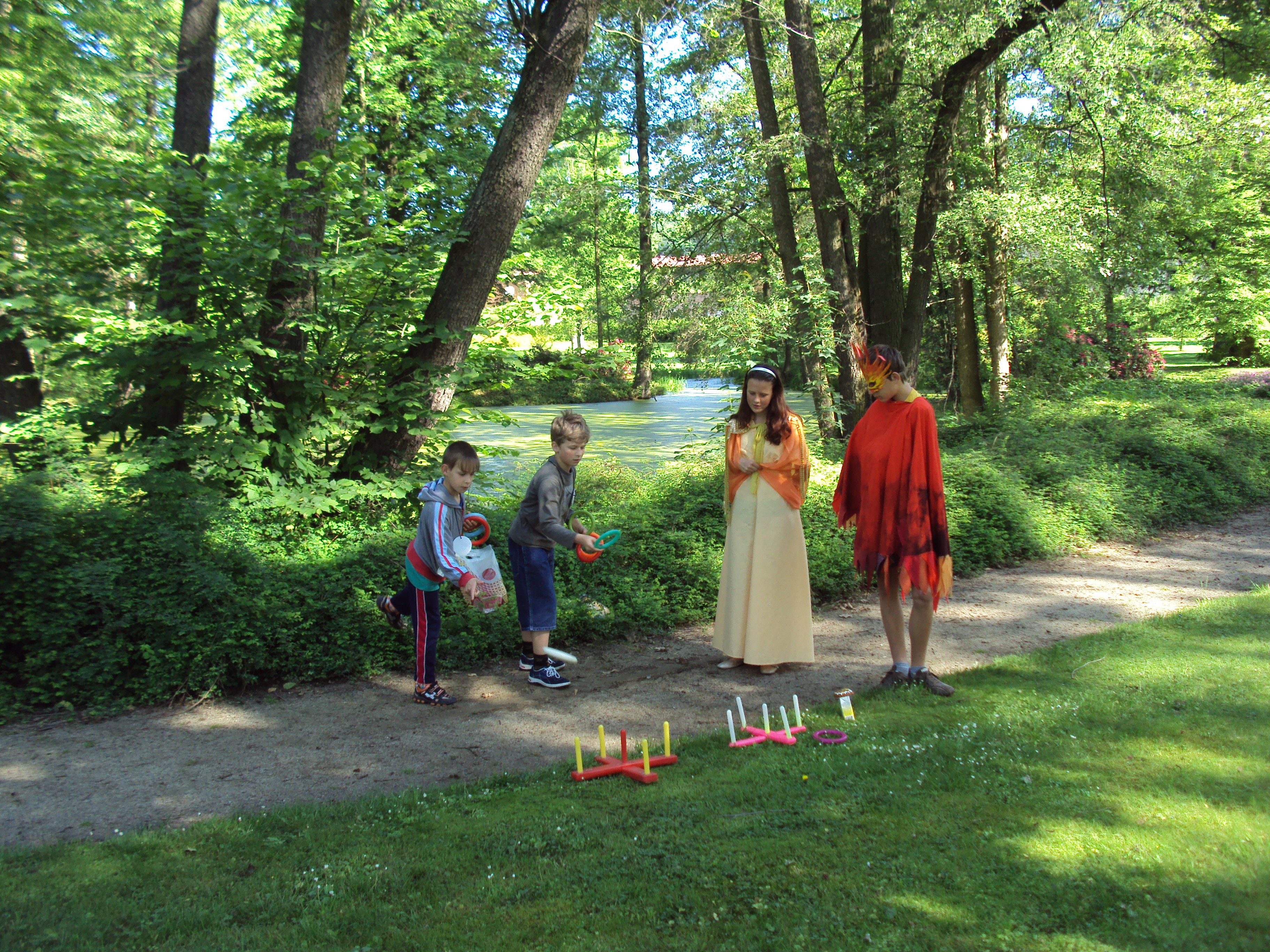 Akce pro děti v zámeckém parku